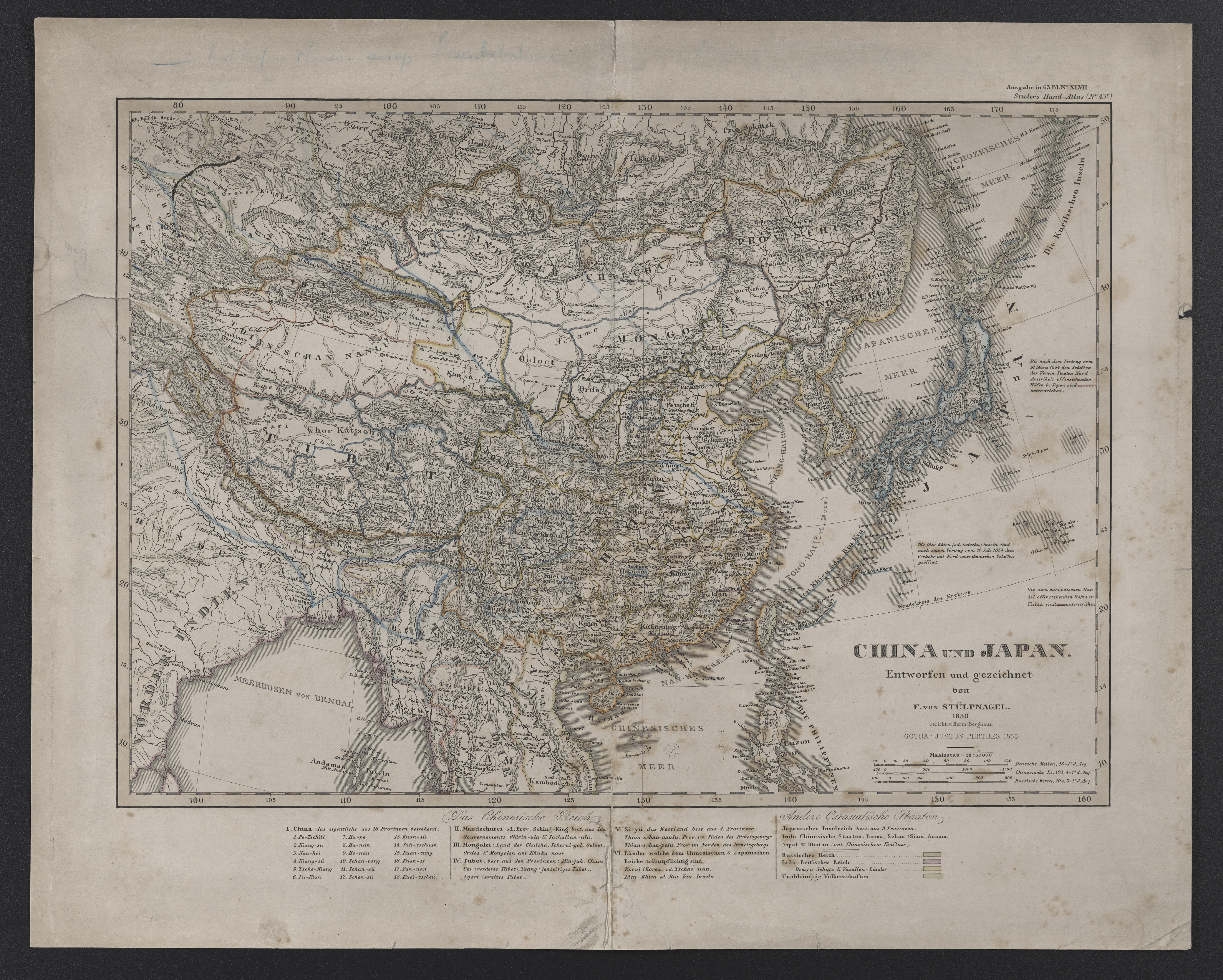 1 Kt. : Grenzen kolor. (37 x 26 cm); Koordinaten E 78°58'00"-E 155°31'00"/N 55°12'00"-N 8°43'00"; Aus: Hand-Atlas Über Alle Theile Der Erde nach dem neuesten Zustande Und Über Das Weltgebäude / Herausgegeben von Adolf Stieler, 43c (Ausgabe in 63 Bl. No. XLVII). - Maßstab in graph. Form (Deutsche Meilen, Chinesische Li). - Titel unten rechts. - Mit Erl. unterhalb des Kt.-Bildes. - Relief: Schraffen